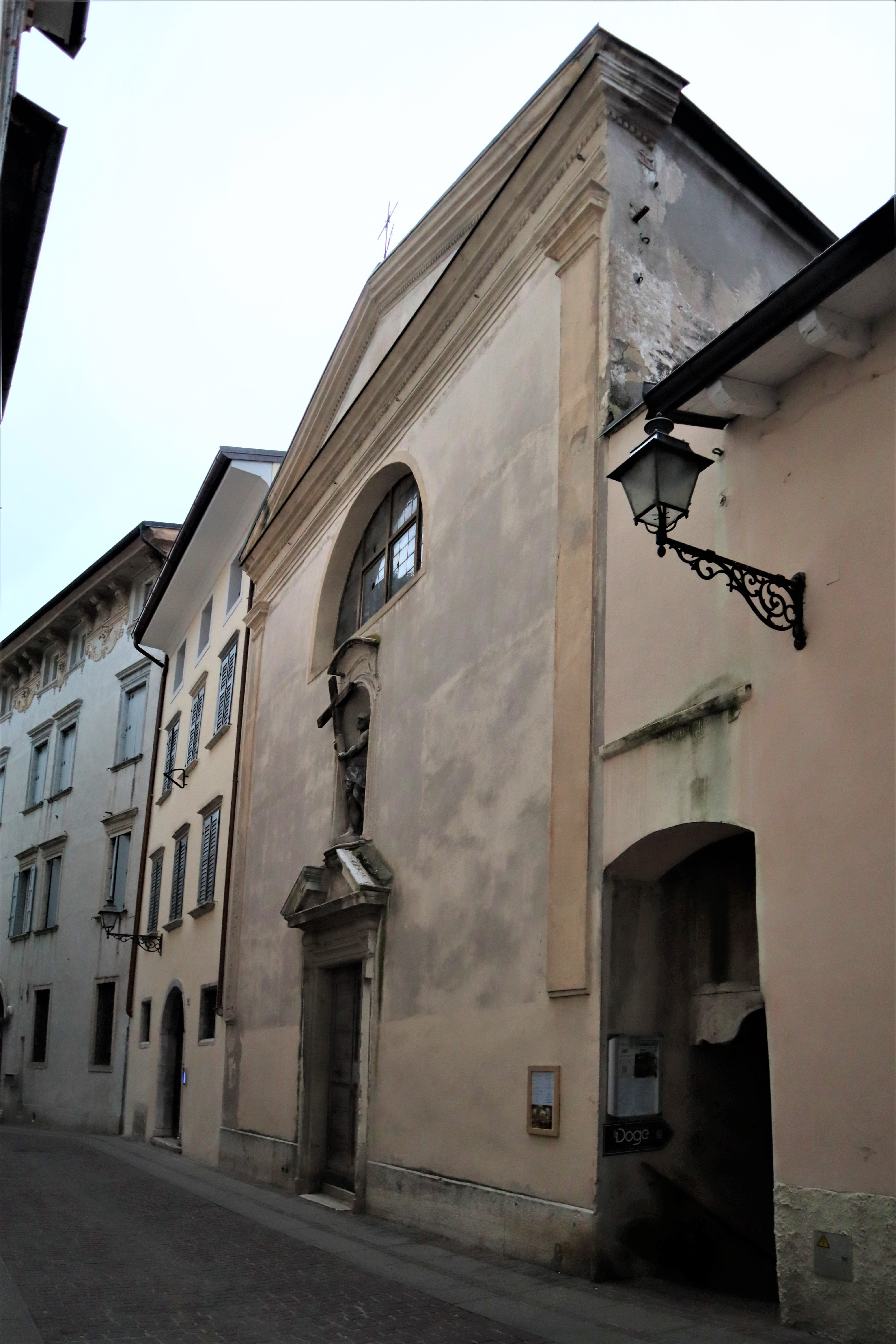 Facciata dell'oratorio del Redentore a Rovereto. Angolo via della Terra e scaletta del Redentore (o salita delle Scalette)